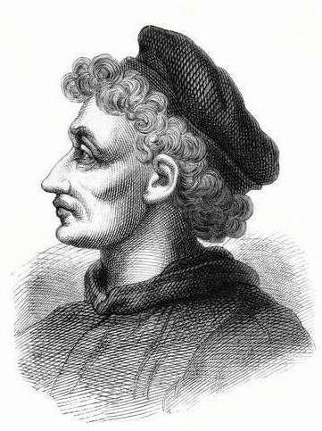 Portrait Antonello da Messina